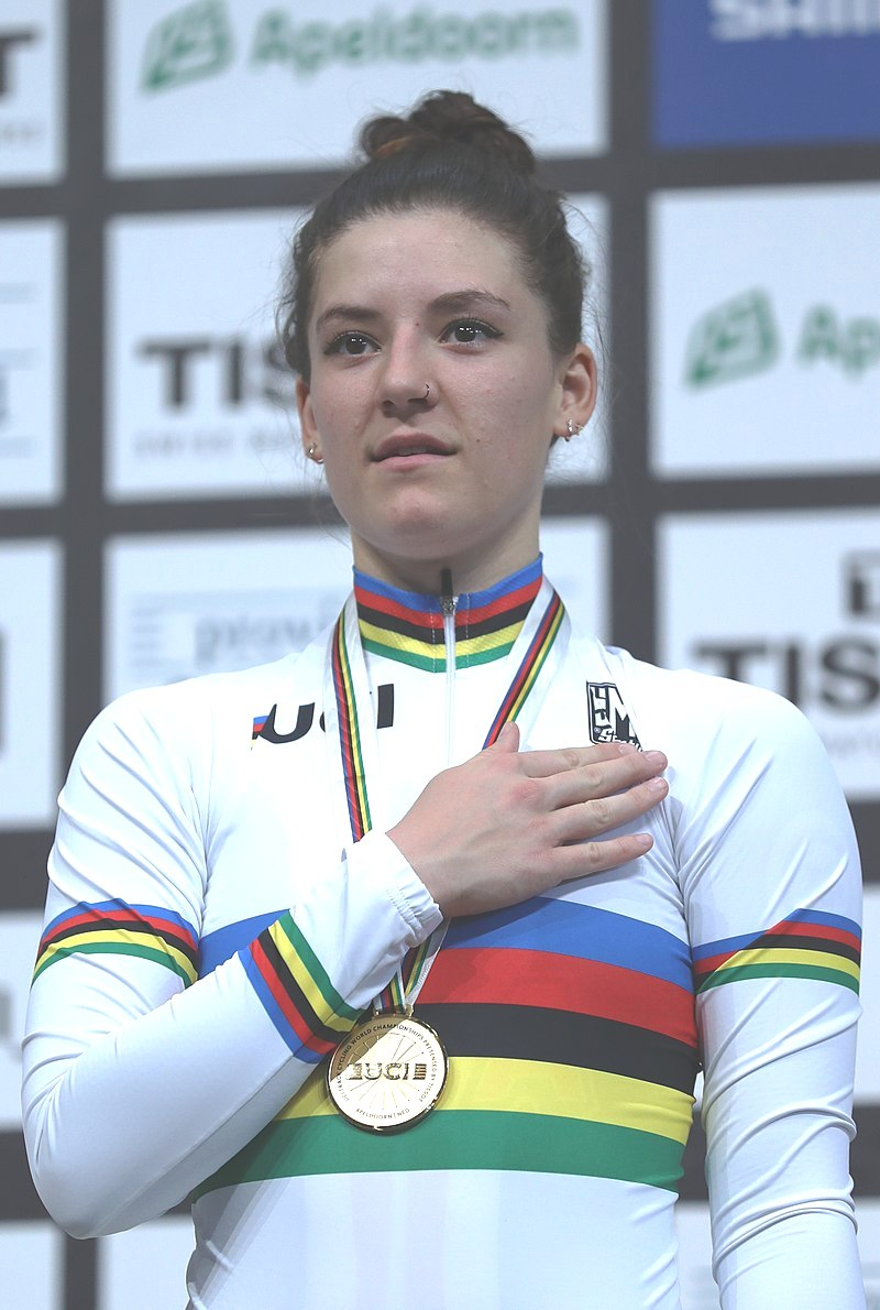 Chloé Dygert, US-amerikanische Radsportlerin - Weltmeisterin in der Einerverfolgung